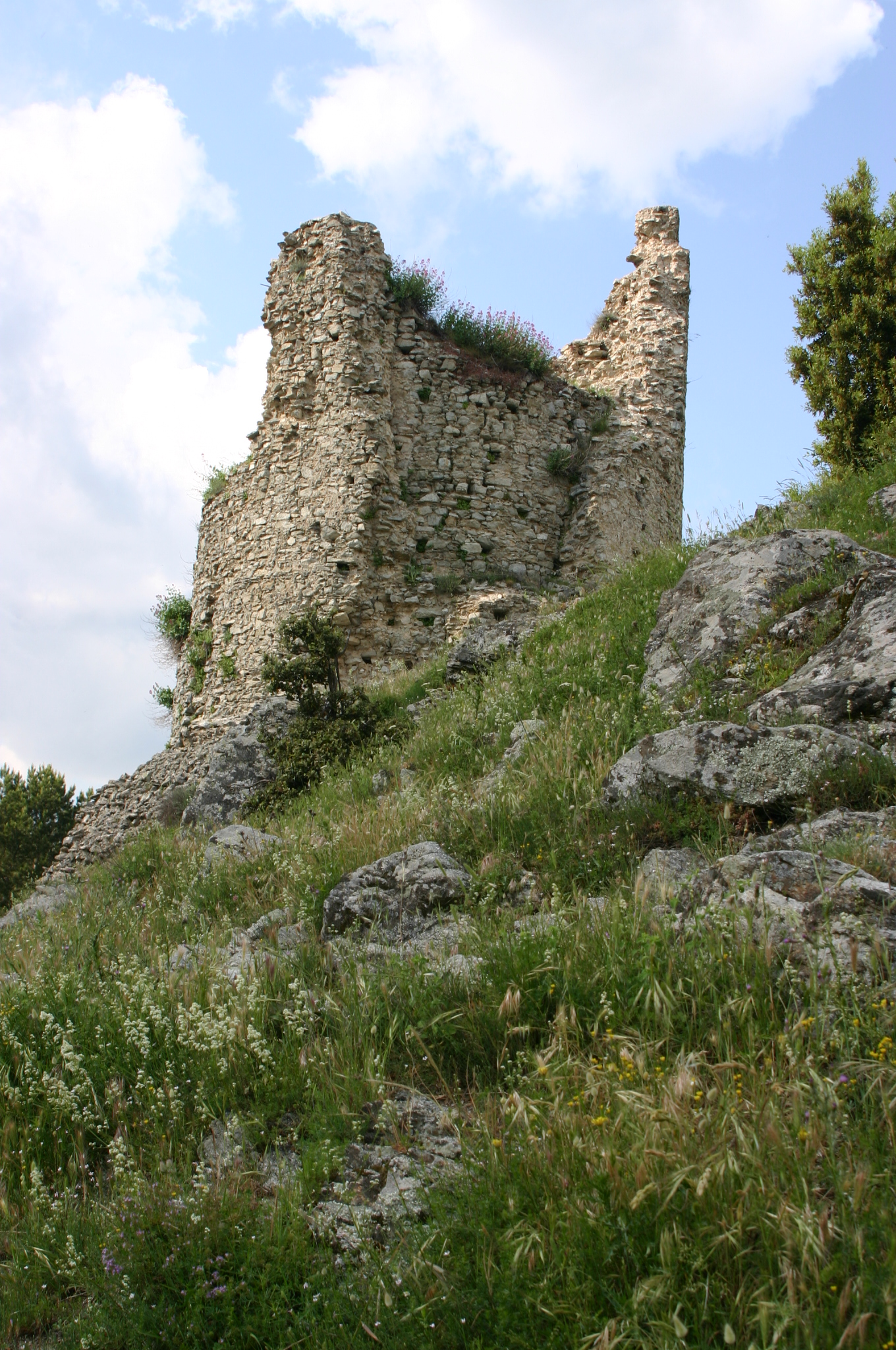 Il "Torrazzo" nel comune di Taverna (CZ)